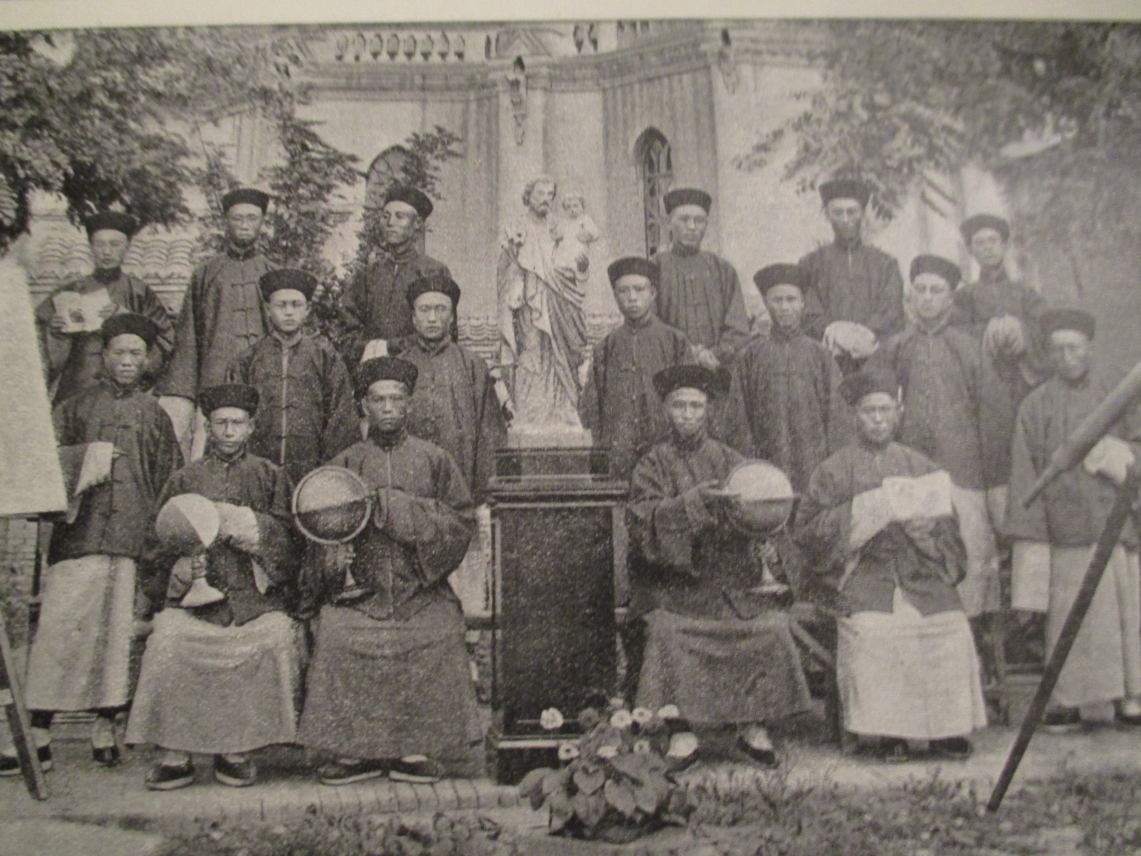 Séminaristes chinois dans une mission jésuite, in "En Chine au Tché-Ly Sud-Est: une mission d'après les missionnaires",du Père Henri-Joseph Leroy, s.j., éd. Desclée de Brouwer, 1900